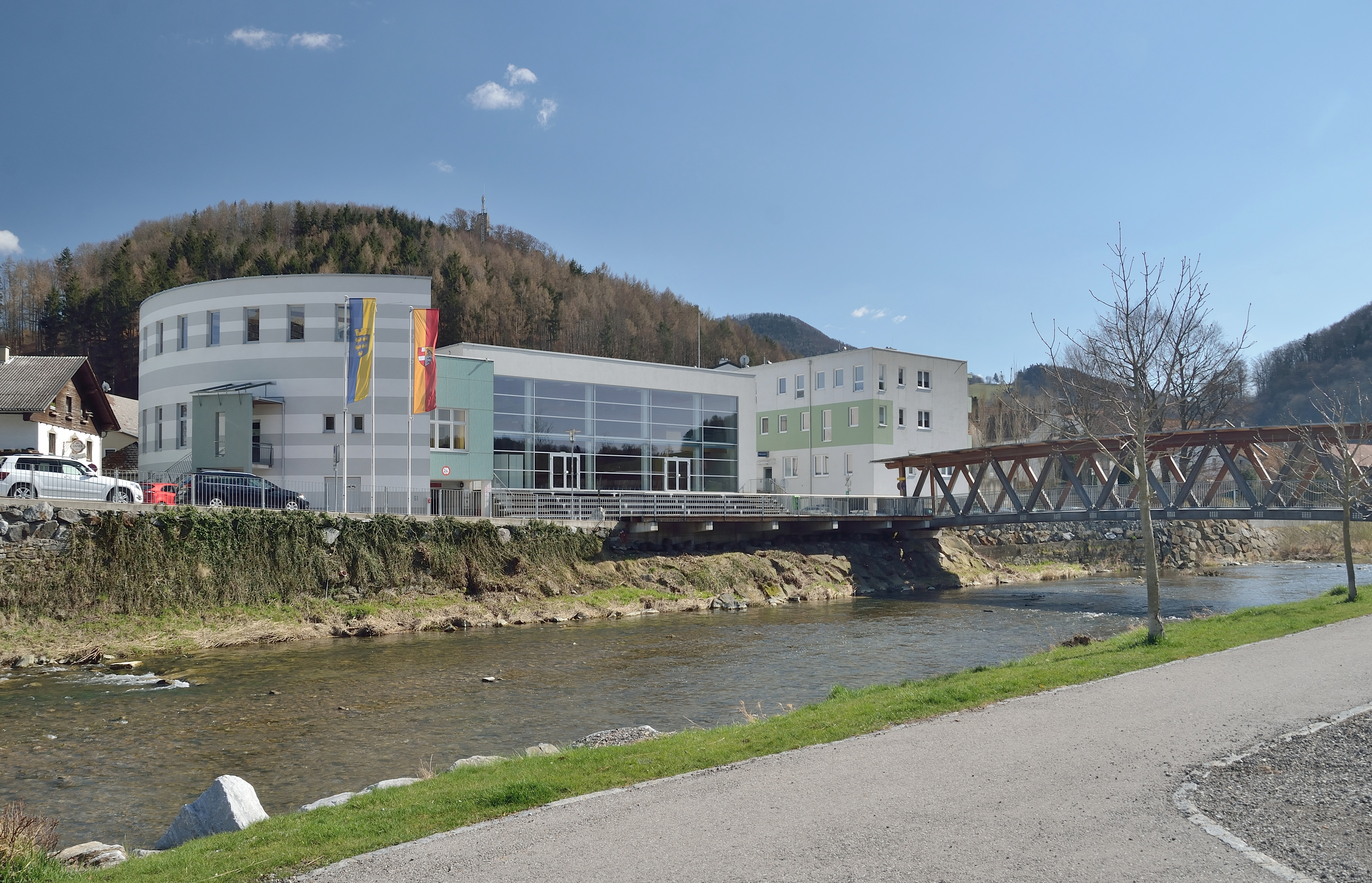 Das Rabensteiner Gemeinde- und Kulturzentrum wurde in den Jahren 2006 bis 2007 errichtet und beinhaltet neben dem Gemeindeamt als Verwaltungszentrum den großen Veranstaltungssaal, die Gemeinde- und Pfarrbücherei, einen Jugendraum, einen Mehrzweckraum (Raben-Saal), das Musikerheim, mit dem "GuK-Stüberl" ein Restaurant, eine Tiefgarage mit 22 Stellplätzen sowie Toiletten und Nebenräume. [1] Rechts die Fußgänger- und Radwegbrücke über die Pielach.